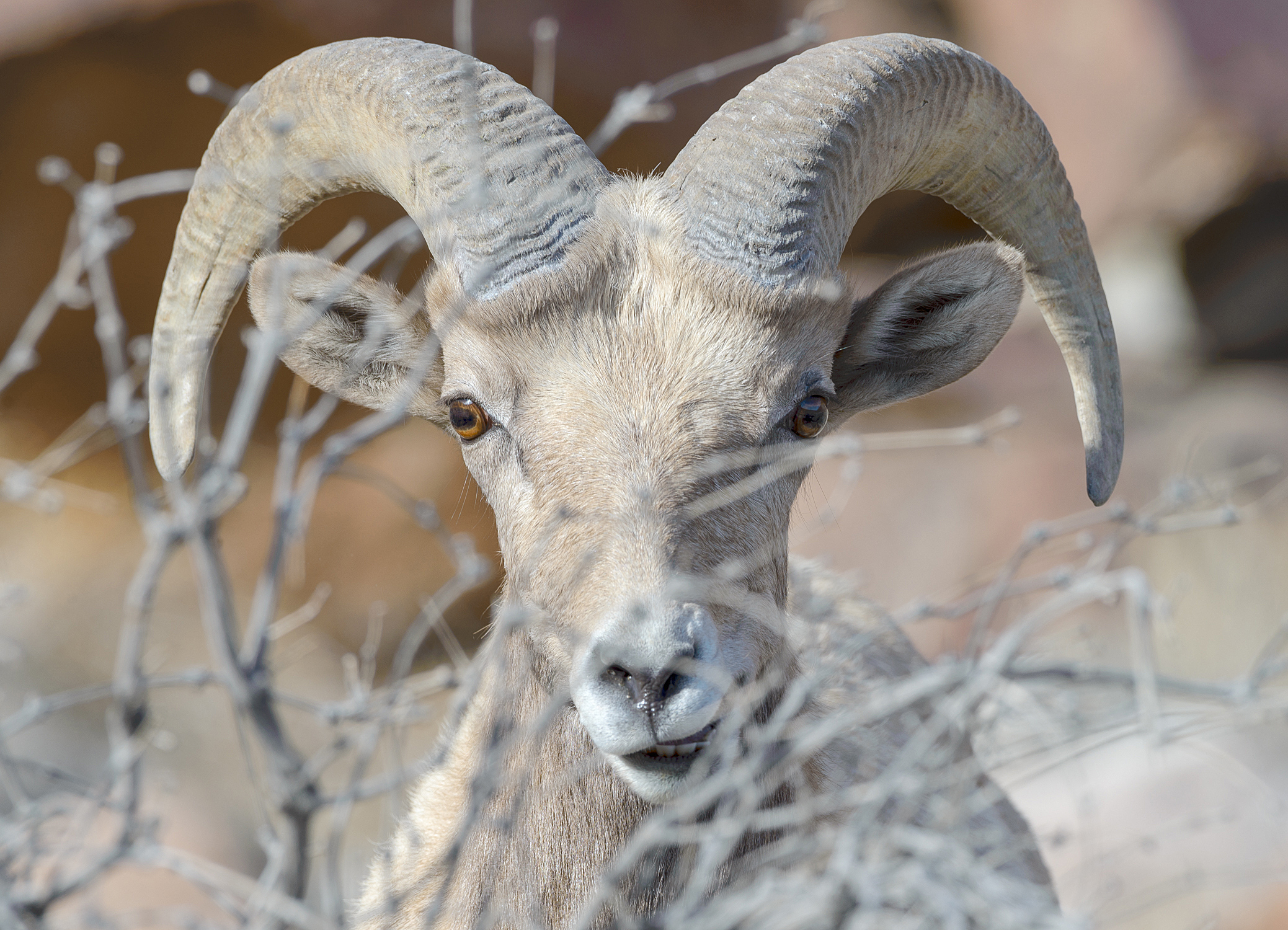 Borrego Palm Canyon bighorn II